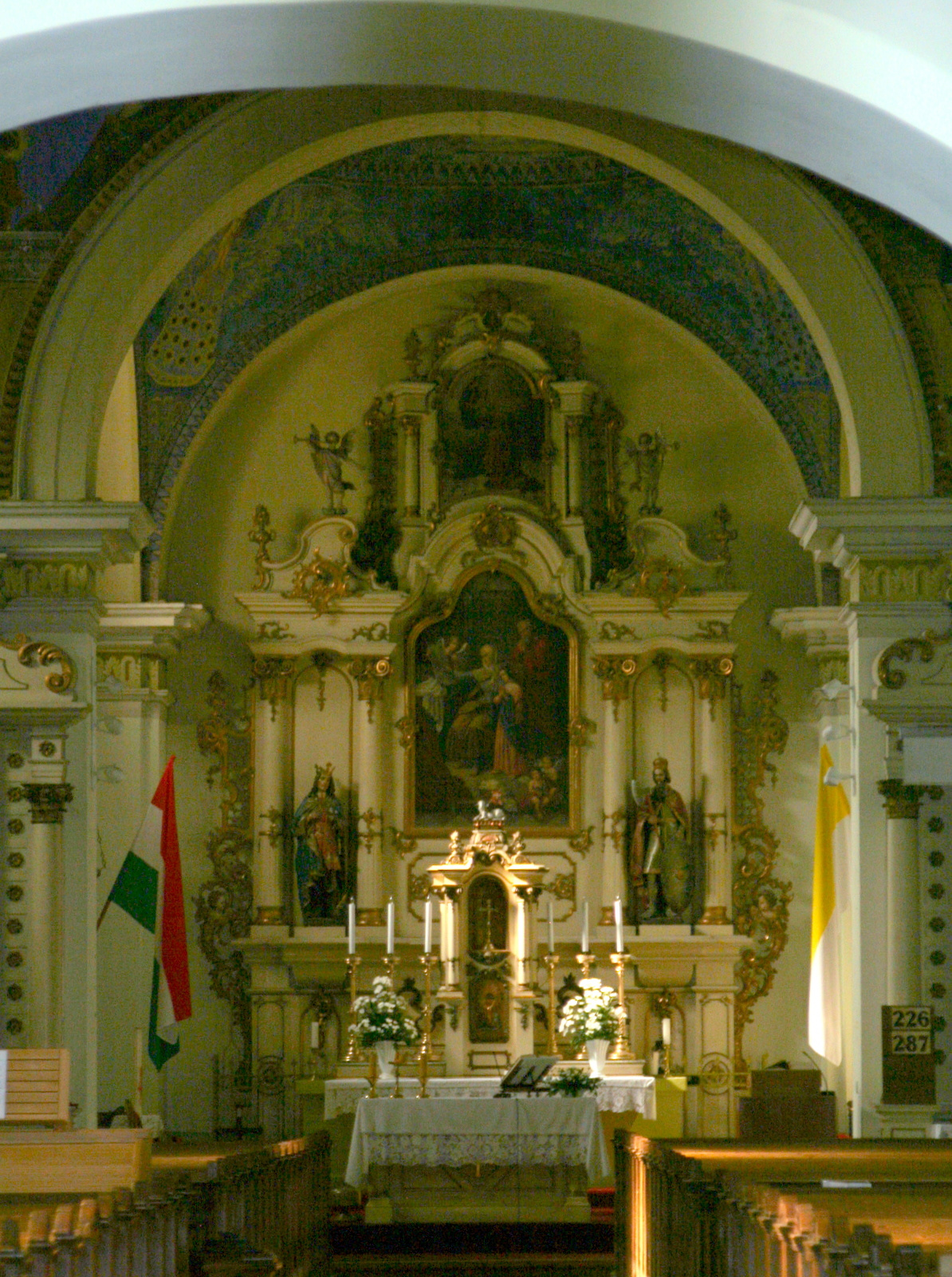 Szent Anna római katolikus templom (Szentes, Szent Imre Herceg utca 2.) This is a photo of a monument in Hungary. Identifier: 3540